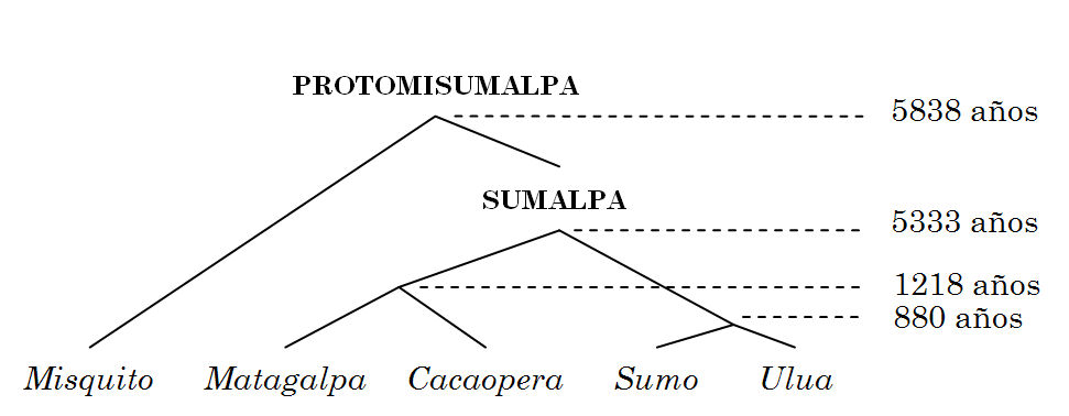 Esquema con la clasificación genealógica de las lenguas misumalpas.